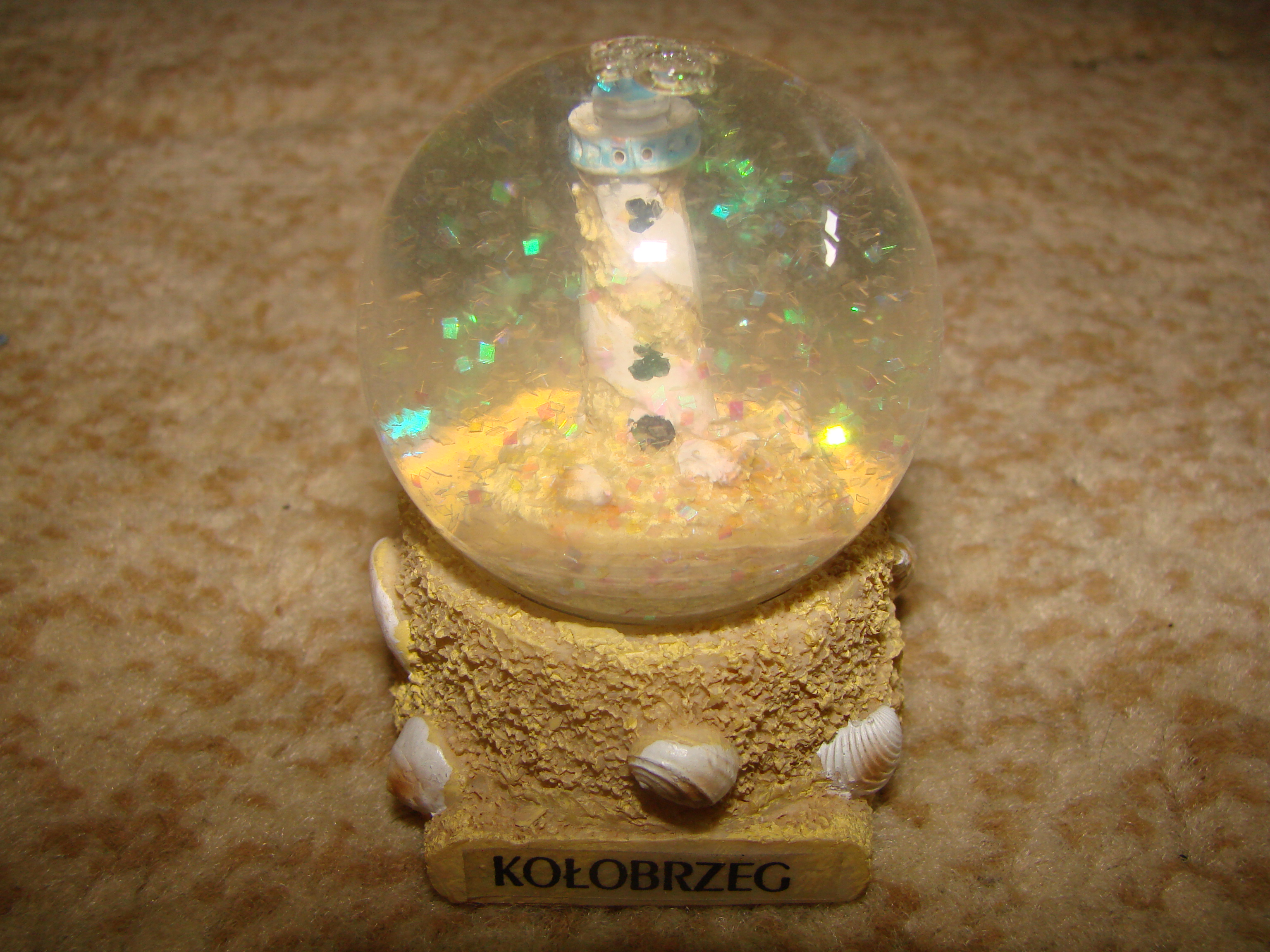 a snow globe, souvenir from Kołobrzeg